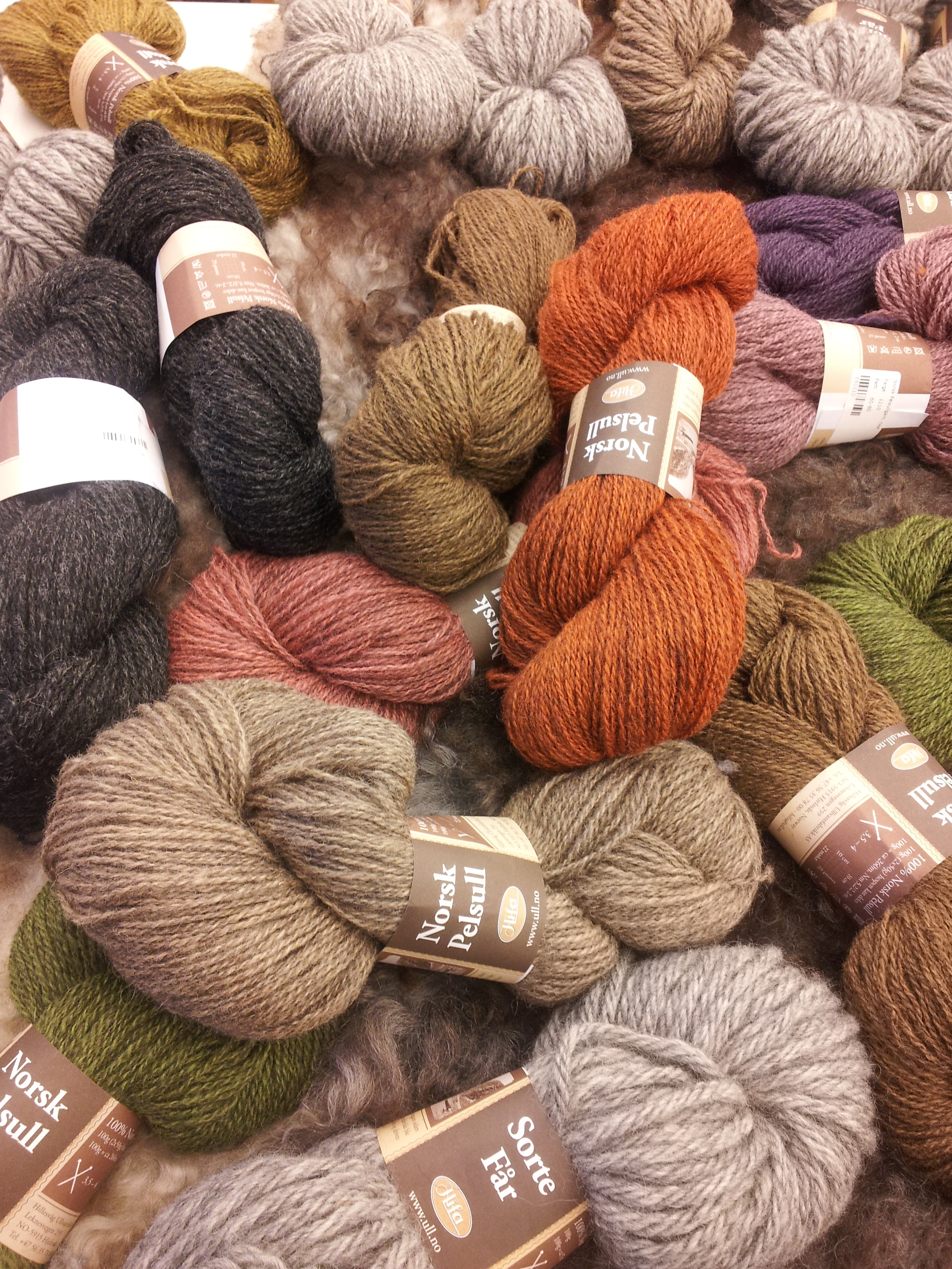 Garn fra Hillesvåg ullvarefabrikk.